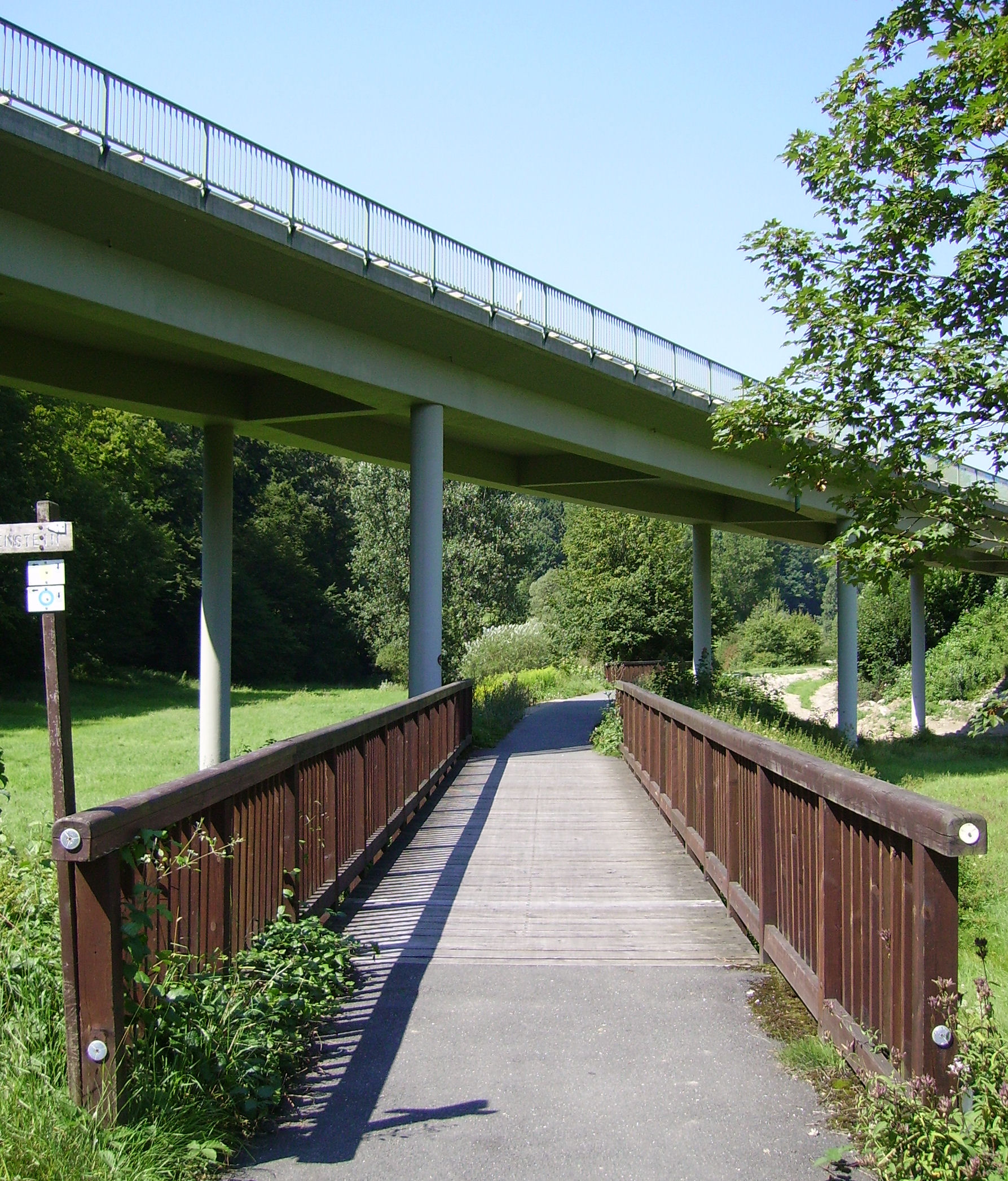 Veilbronn near Heiligenstadt in (Franconia)